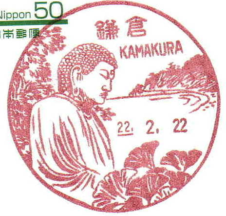 鎌倉郵便局が1948年以来使用している風景印